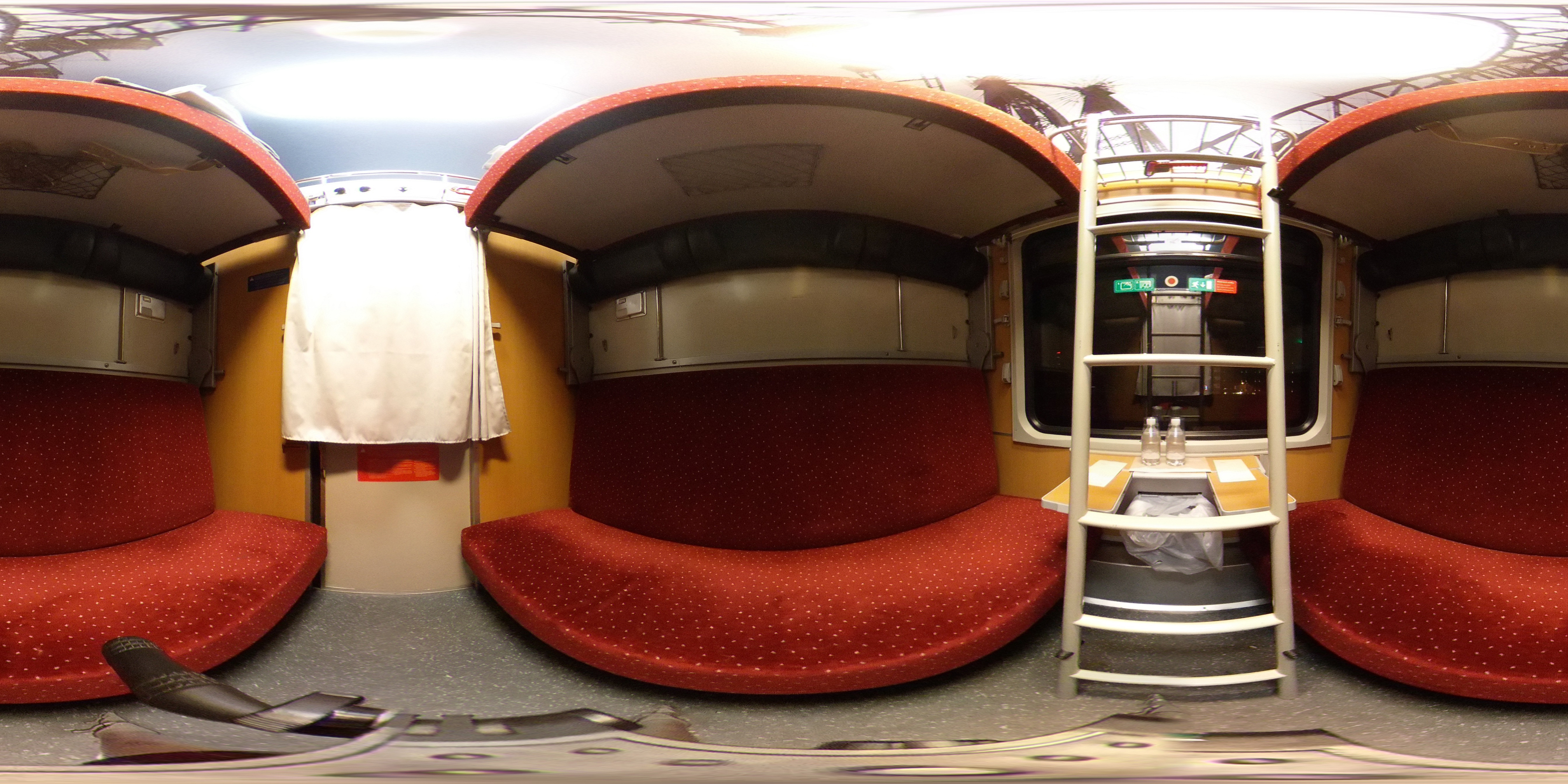 ÖBB, Nachtzug, Liegewagen.